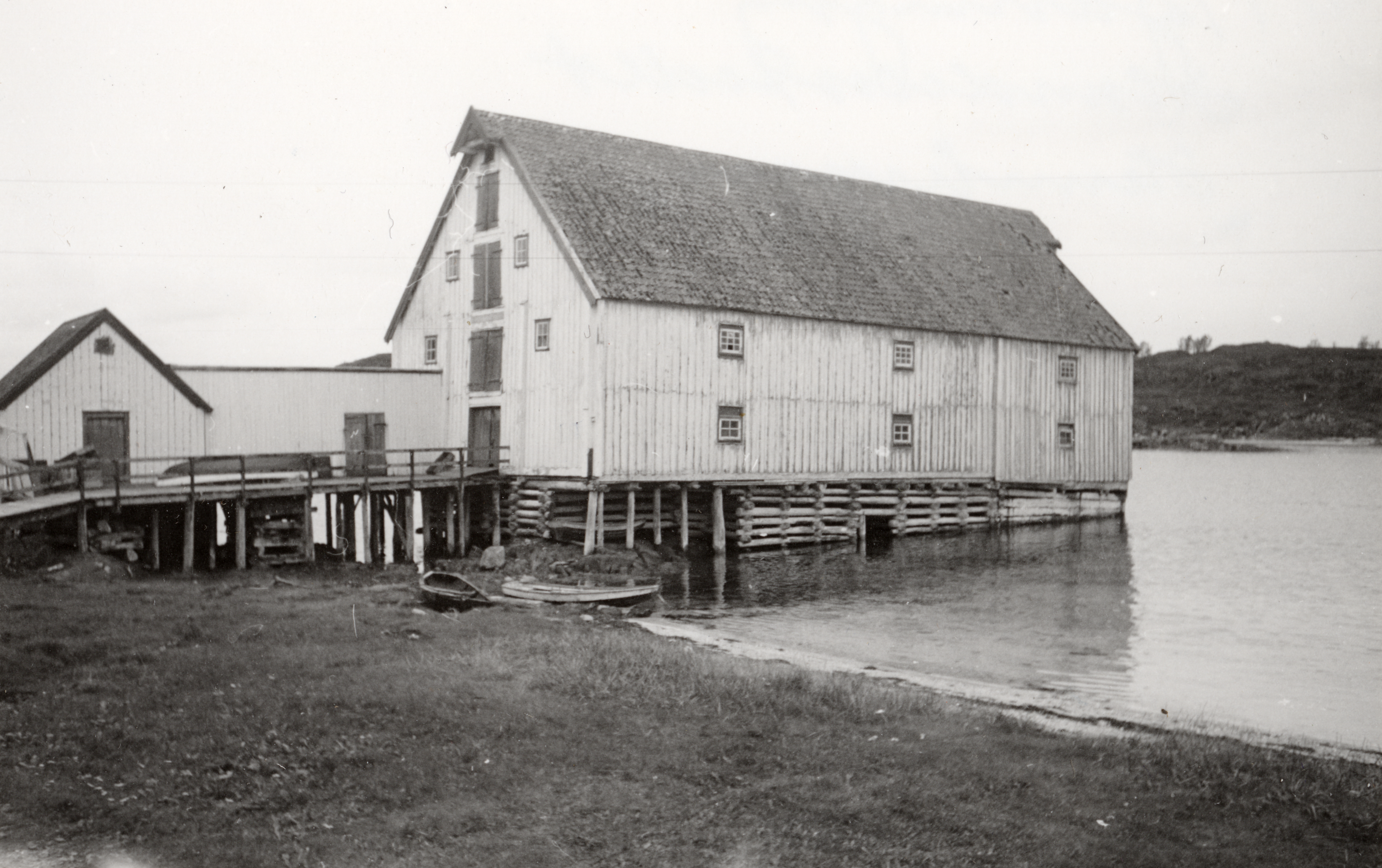 Kjerringøy handelssted i Bodø, Nordland